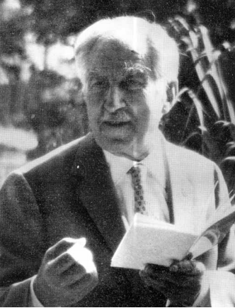 Salvatore Cardella (Caltanissetta, 24 giugno 1896 – Palermo, 1975) è stato un architetto italiano, esponente del modernismo.